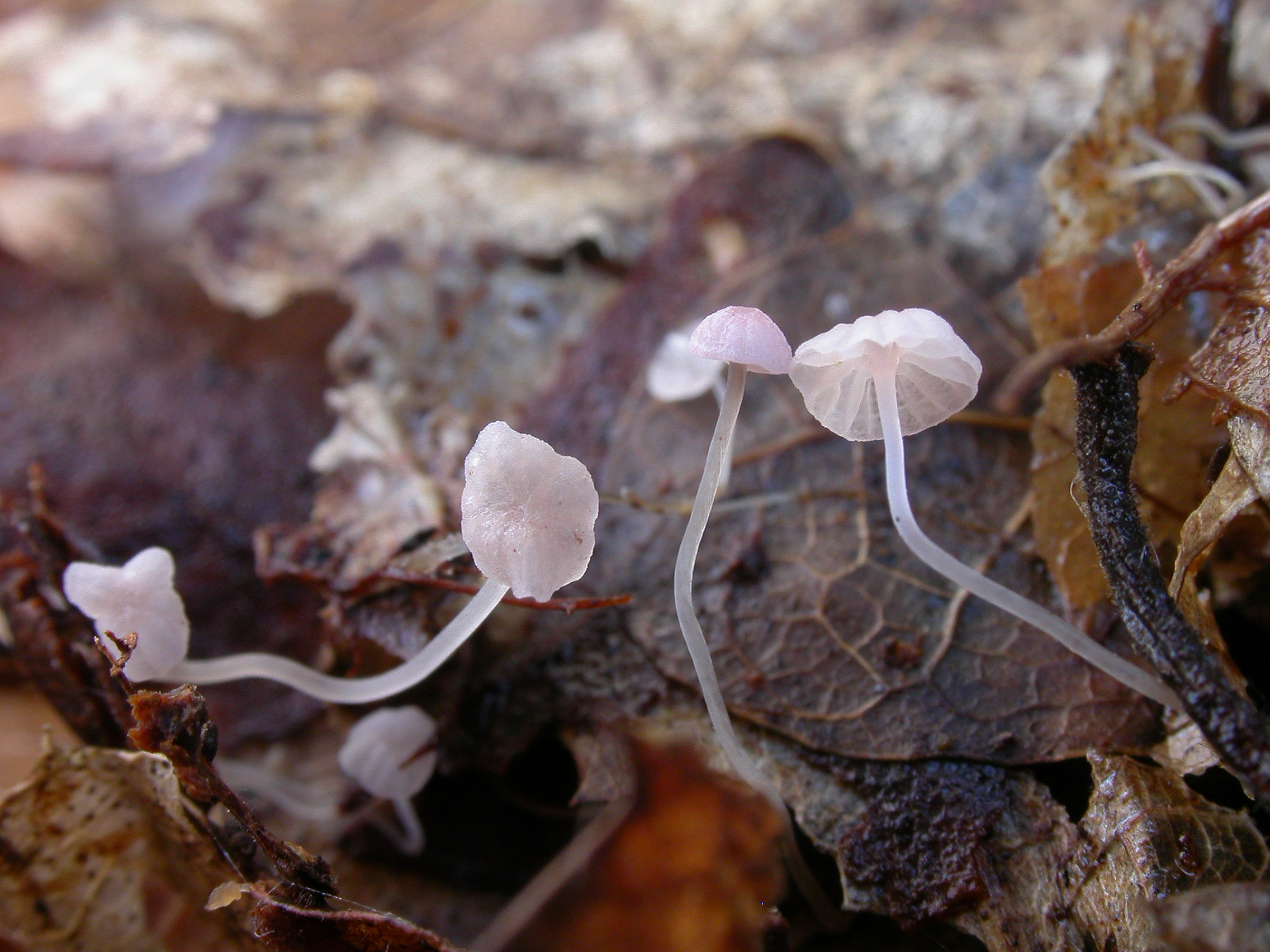 Sopparten grårosa bladhette (Mycena smithiana).